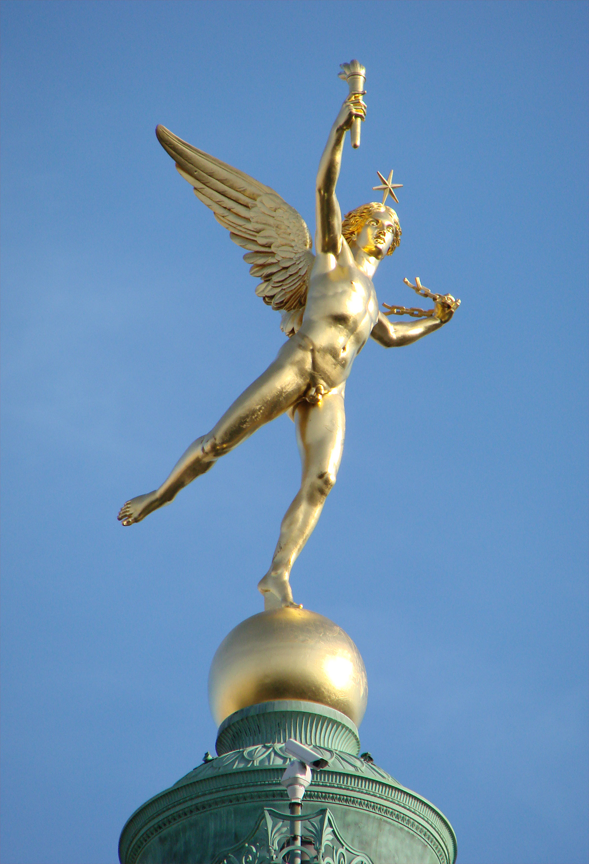 Le Génie de la Liberté, statue d'Augustin Dumont (1801 - 1884), couronnant la colonne de Juillet, sur la place de la Bastille à Paris.